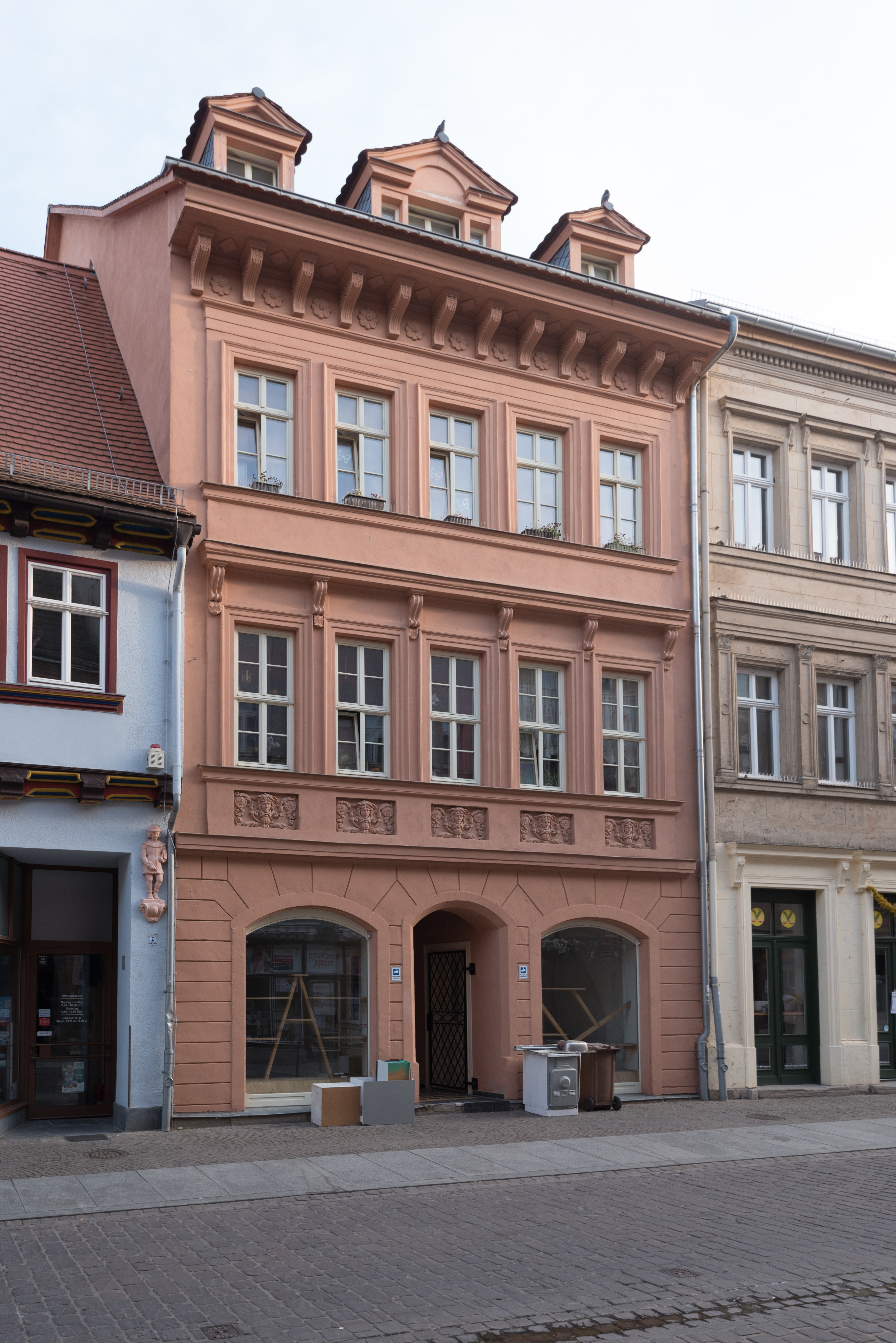 Naumburg (Saale), Jakobstraße 11